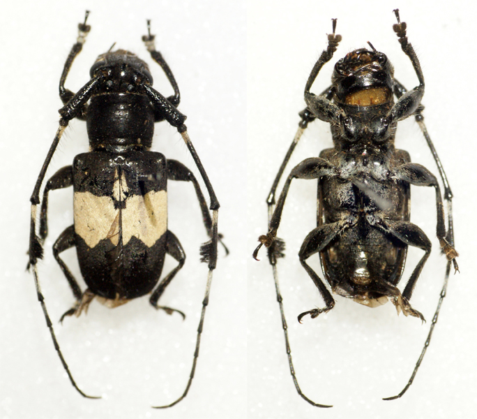 Heller,1923 Sex: ? Data: 08-2013 - Kayapa - Nueva Vizcaya - North Luzon - Philippines Size: ?